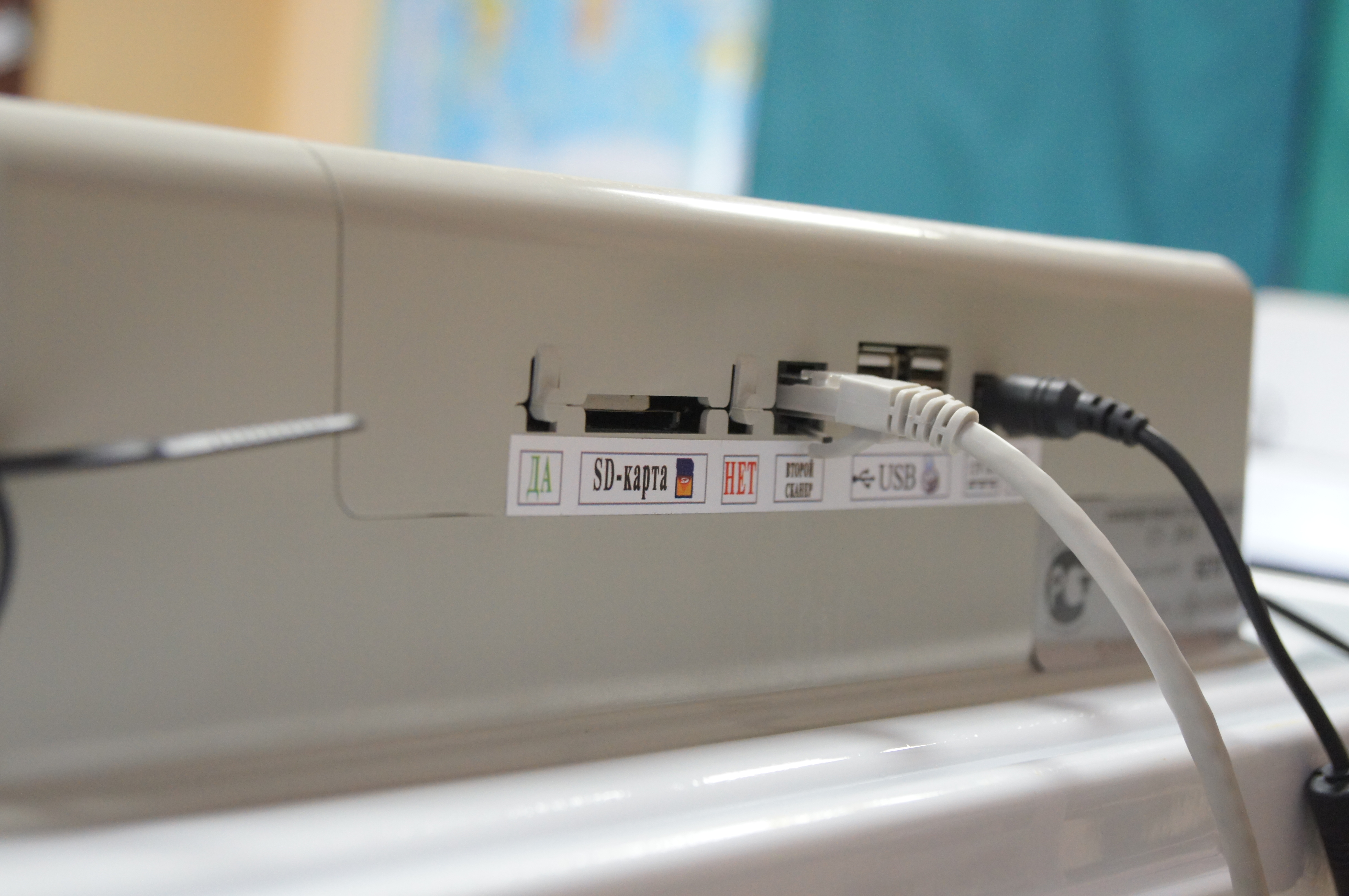 Ведомый сканер КОИБ